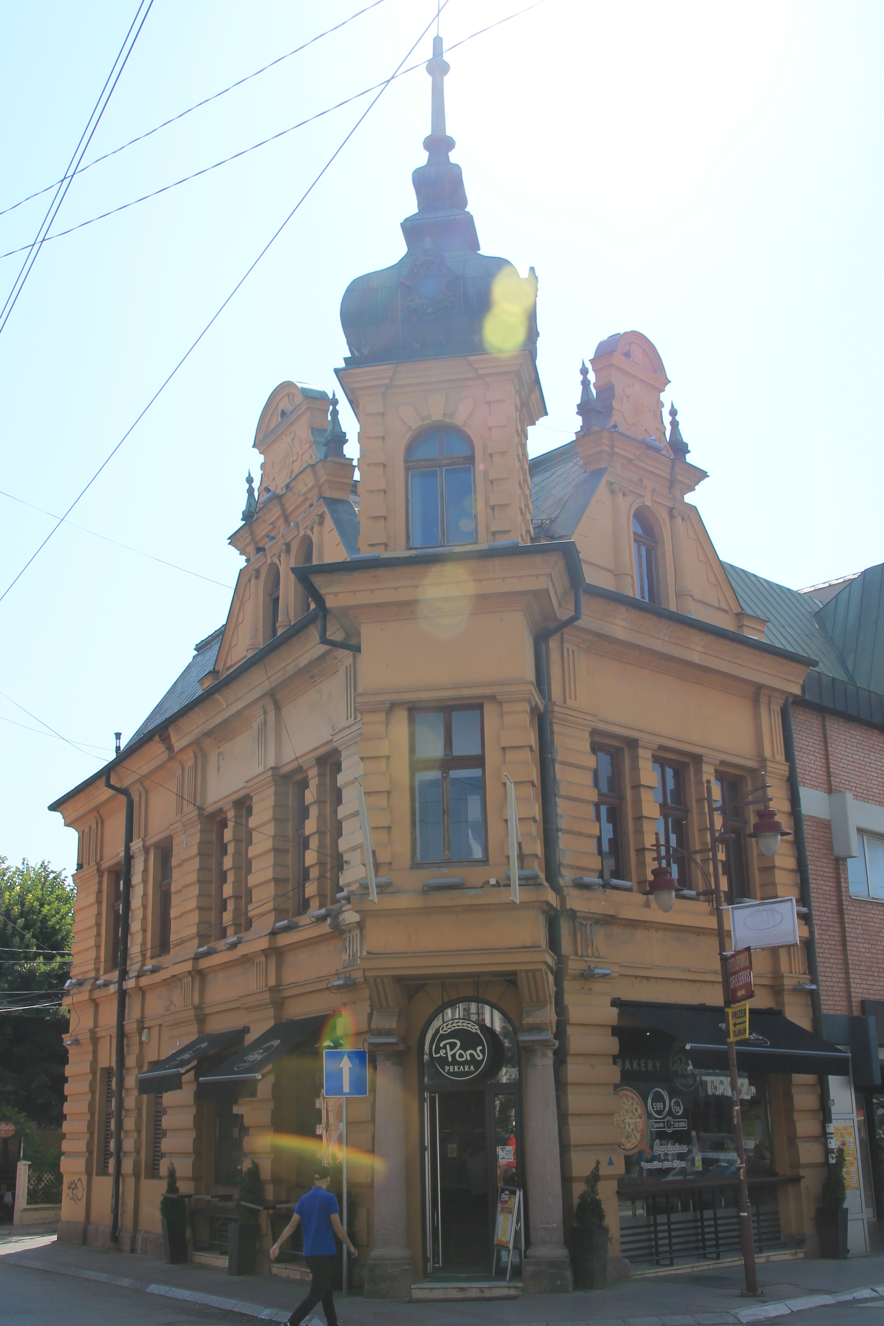 Aćimovića kuća